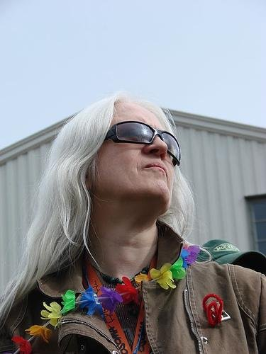 Andrea Jónsdóttir